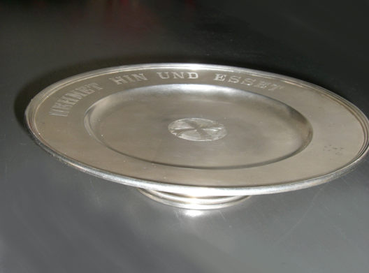 evangelischer Abendmahlspatene